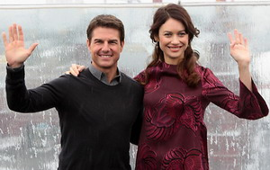 Том Круз в Москве